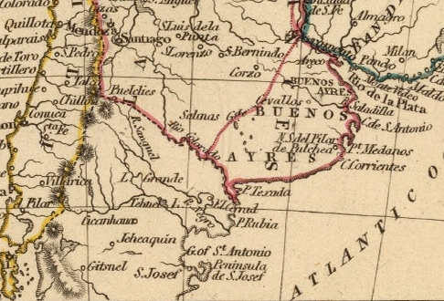 Detalle de un mapa de las Provincias Unidas en 1835